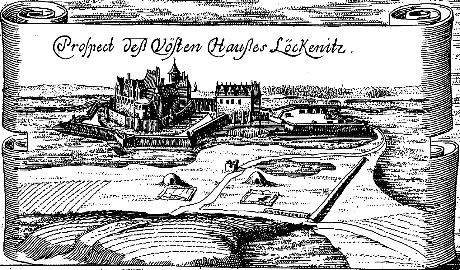 Prospect des Vösten Hauses Löckenitz (Detail aus: Grundtriß des Vösten Grentzhaußes Löckenitz)